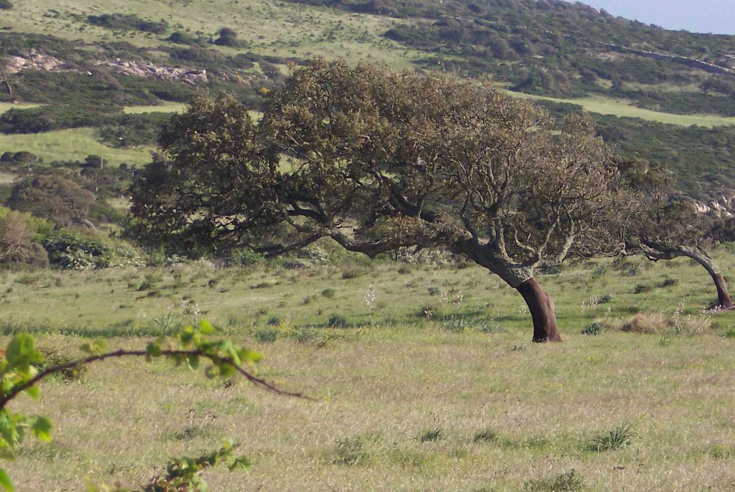 Durch den Mistral geformte Korkeiche (Quercus suber) im Rhonetal